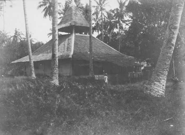 Foto. Moskee